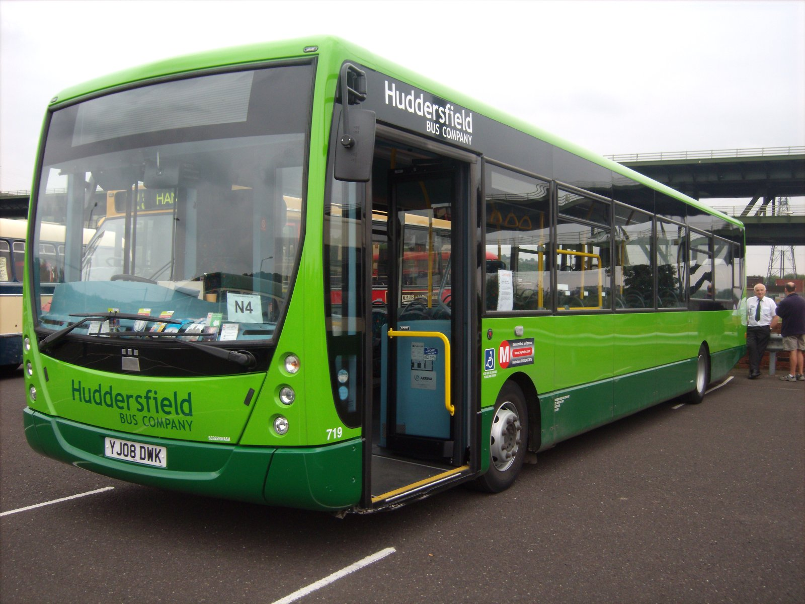 Ge digital camera